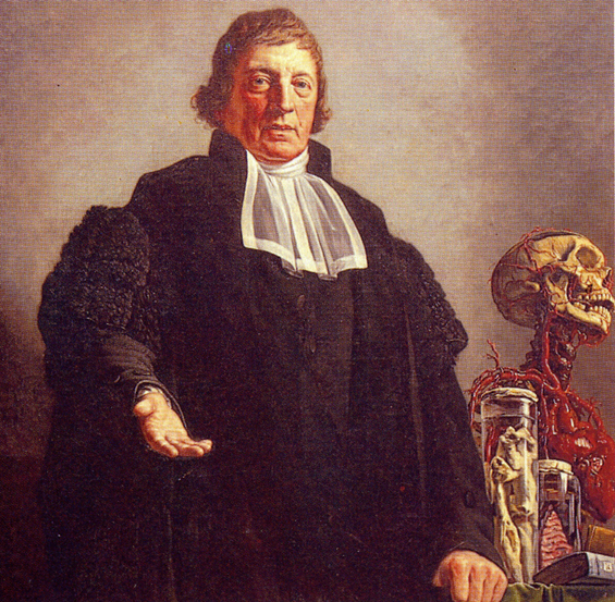 Geschilderd portret van prof. dr. Jan Bleuland (1756-1838). Kopie van een reproductie van een origineel, dat in het bezit is van het Universiteitsmuseum Utrecht.